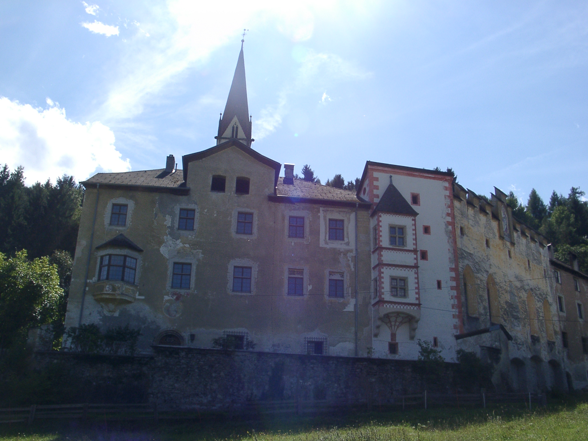 Flaurling: Risen-Schlösslein